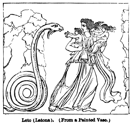 Leto (Latona).